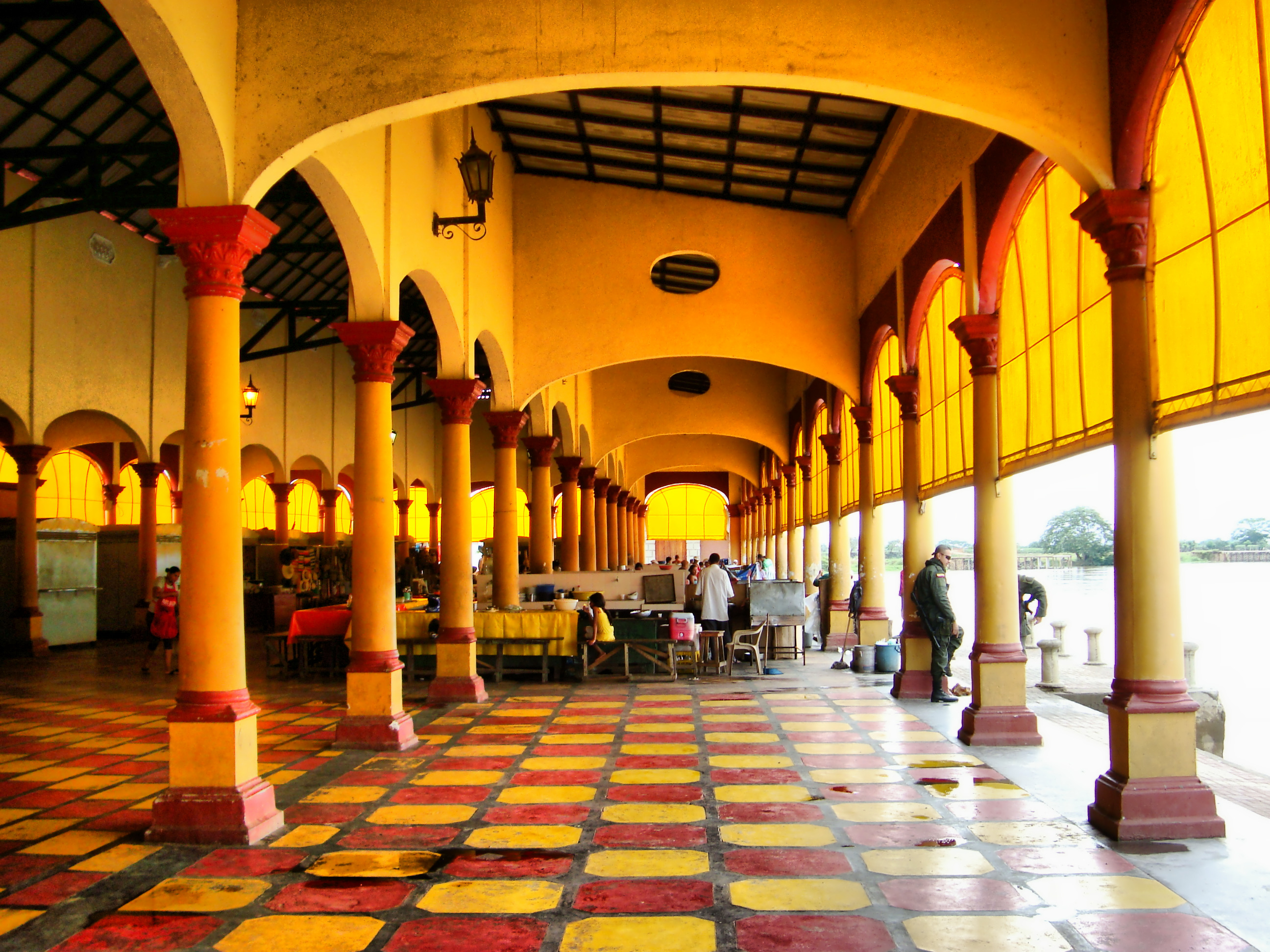 Edificio del Mercado Público de Santa Cruz de Lorica